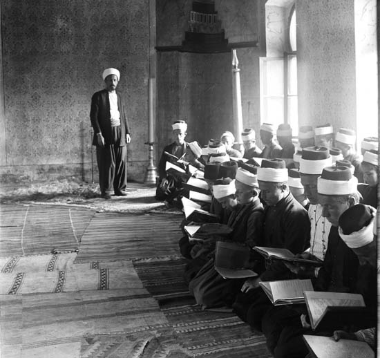 Bosna - madrasa